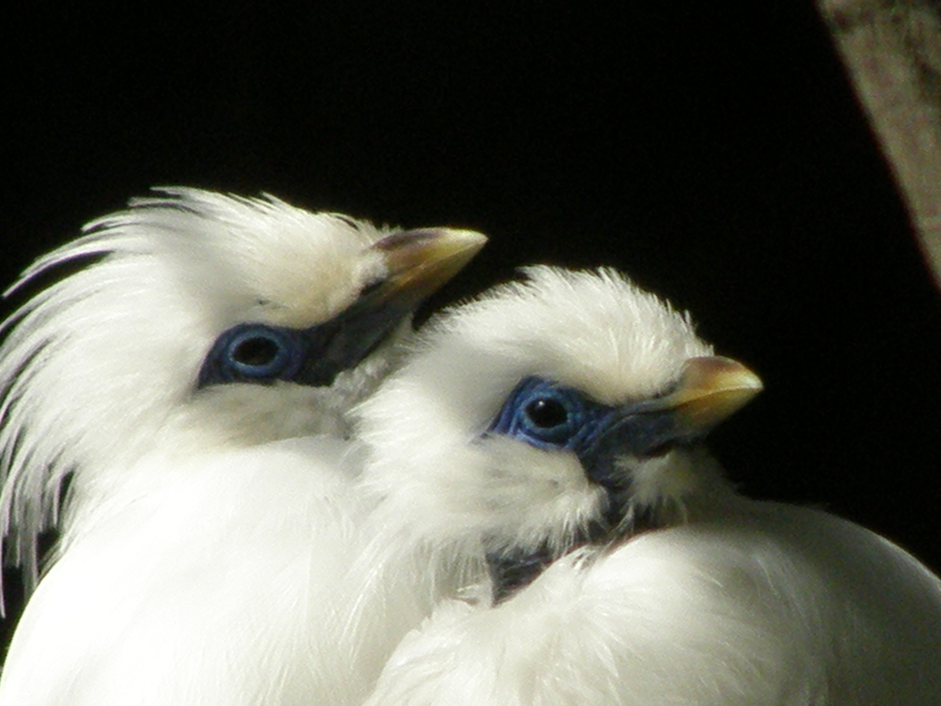 balispreeuw